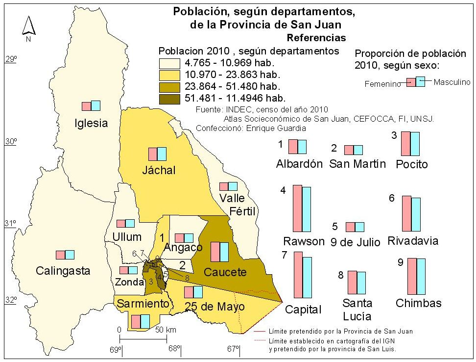 Mapa de la provincia argentina de San Juan donde se representa la distribución de población para en año 2010